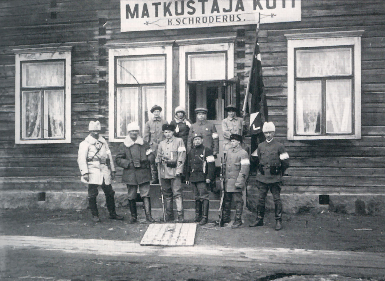 Ensimmäisen Petsamon-retken esikunta Rovaniemellä 1918. Kuvassa eturivissä vasemmalra retken johtaja Torsten Renvall, Johan Bäckman, Julius Niemura, Jalmari Ruokokoski. Arvi Vinberg ja Hjalmar Mehring. Takana: Ellen Id, Elvi Halleen, Helge Aspelund, Ester Fogelberg, joka kannattelee taiteilija Ruokokosken suunnittelemaa sotalippua.